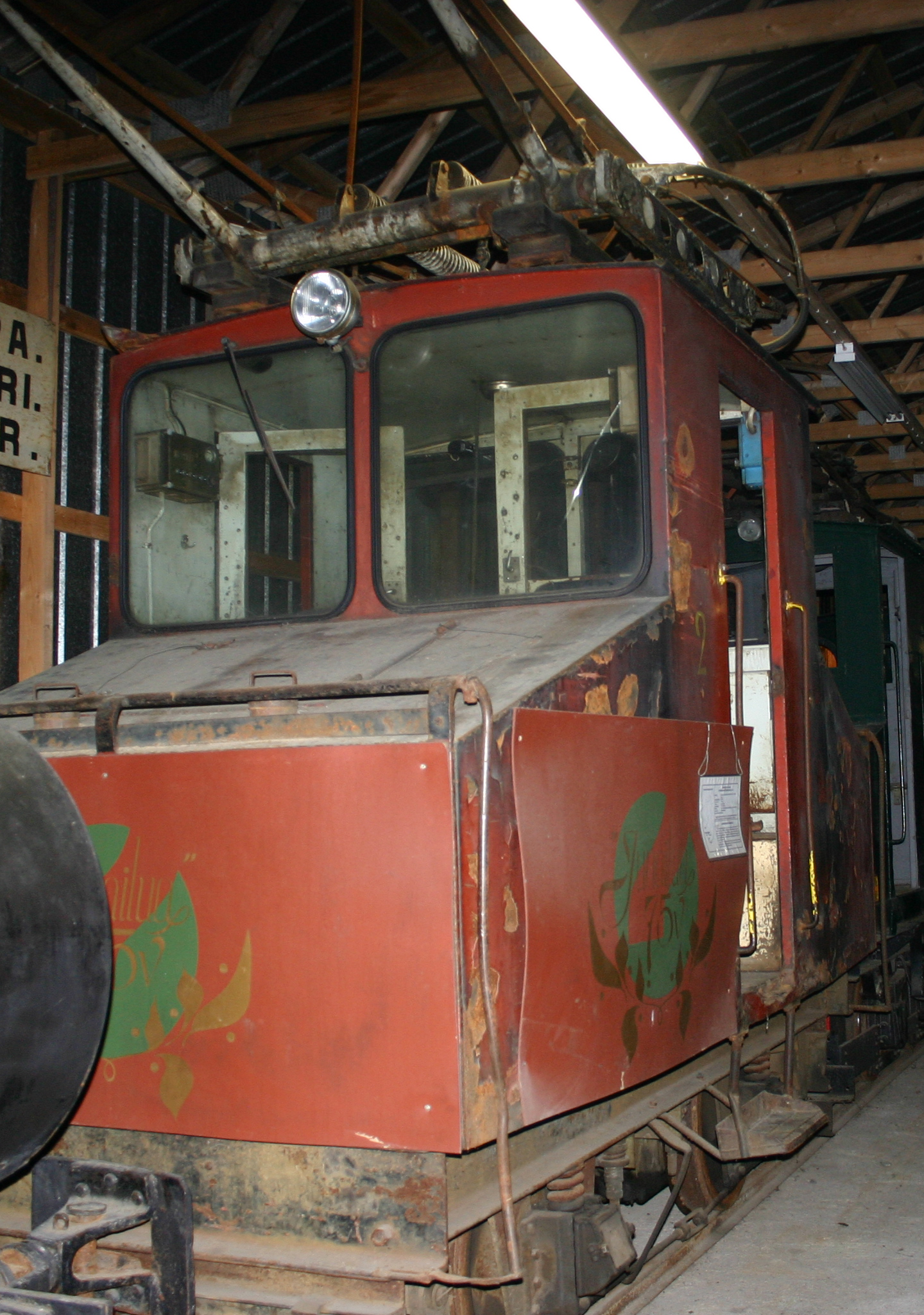 Kyröskosken radan sähköveturi.